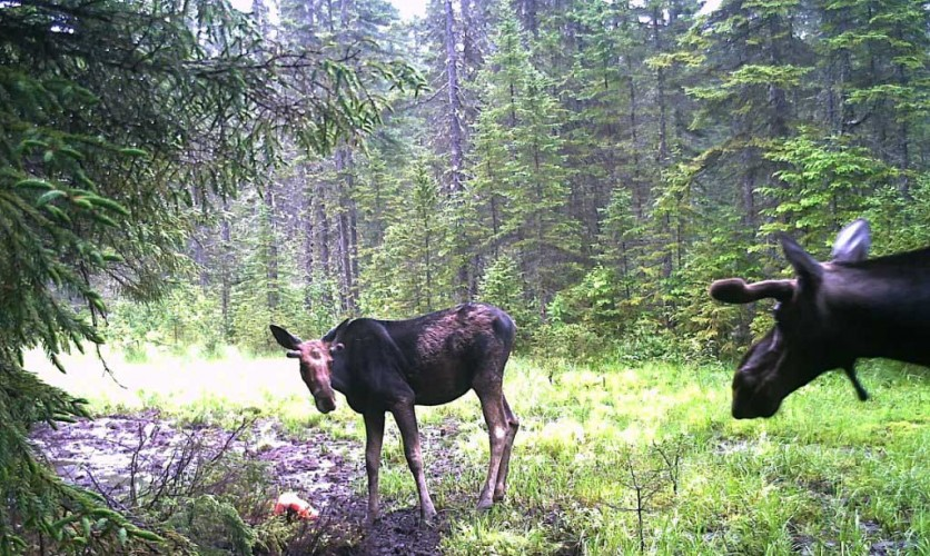 Deux orignaux aux abord du Rang St-Camille, printemps 2011.